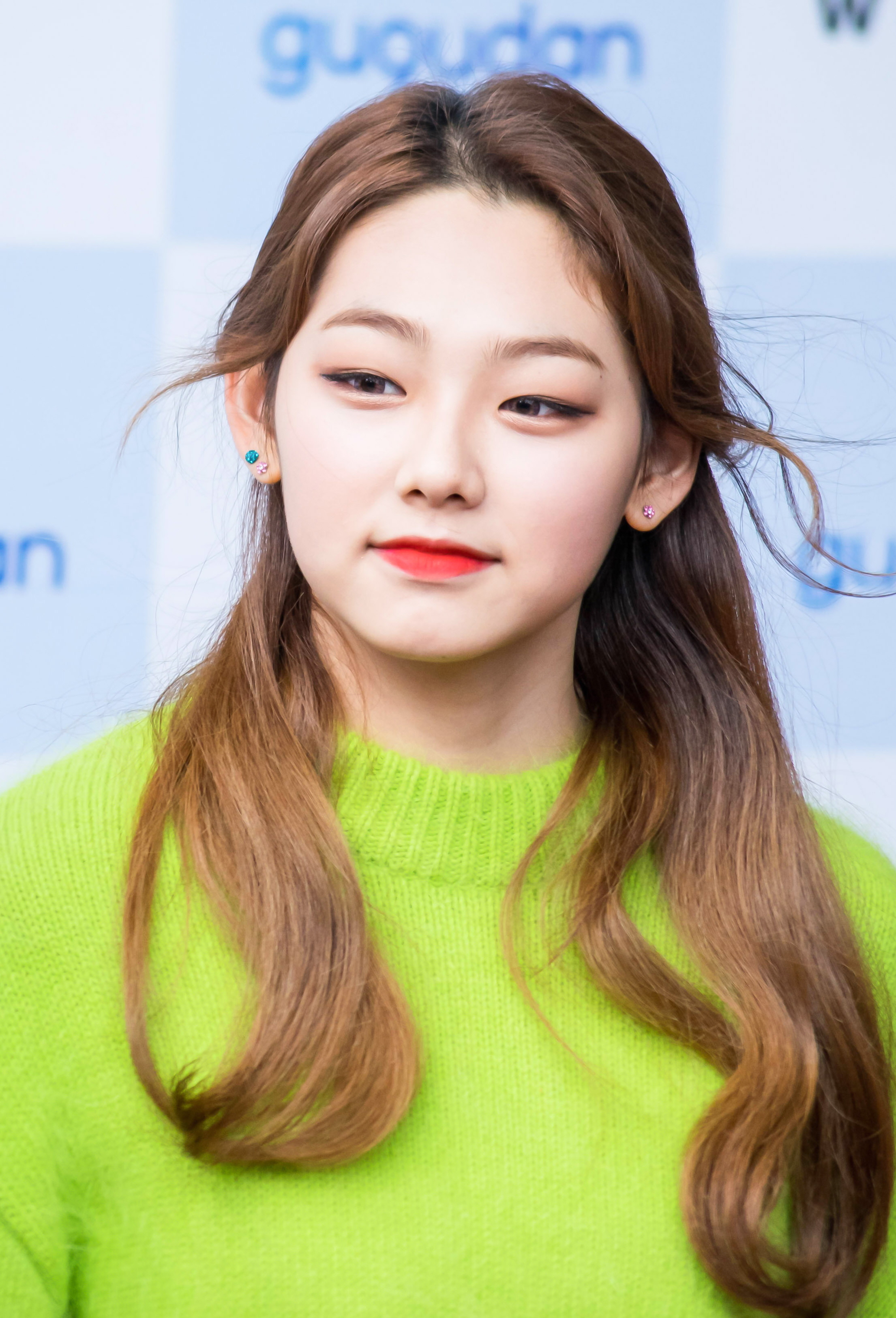 161112 파고슈즈 구구단 팬사인회